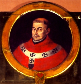 Bartolomé Lobo Guerrero (1546 - 1623) III Arzobispo de Lima 1607-1622.